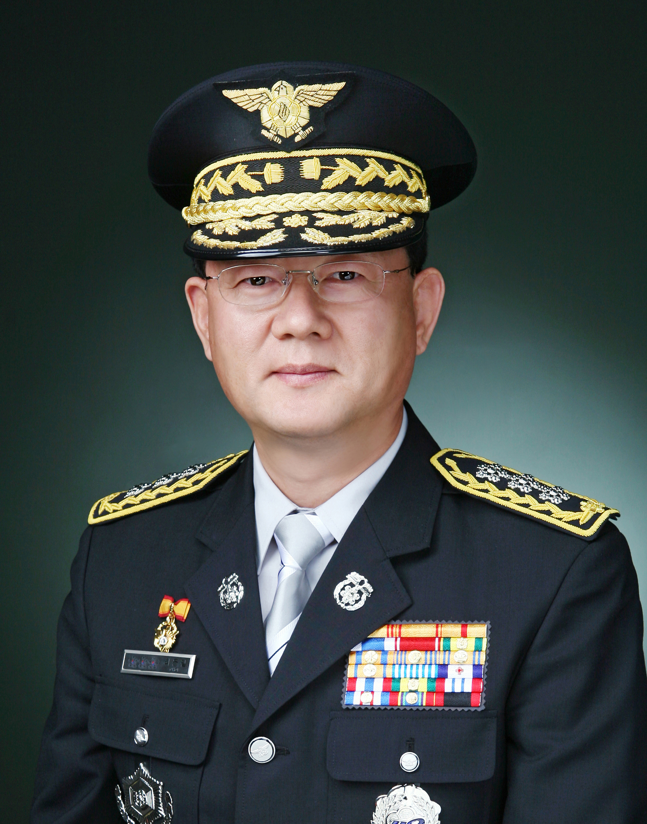 제24대 서울소방재난본부장 최웅길